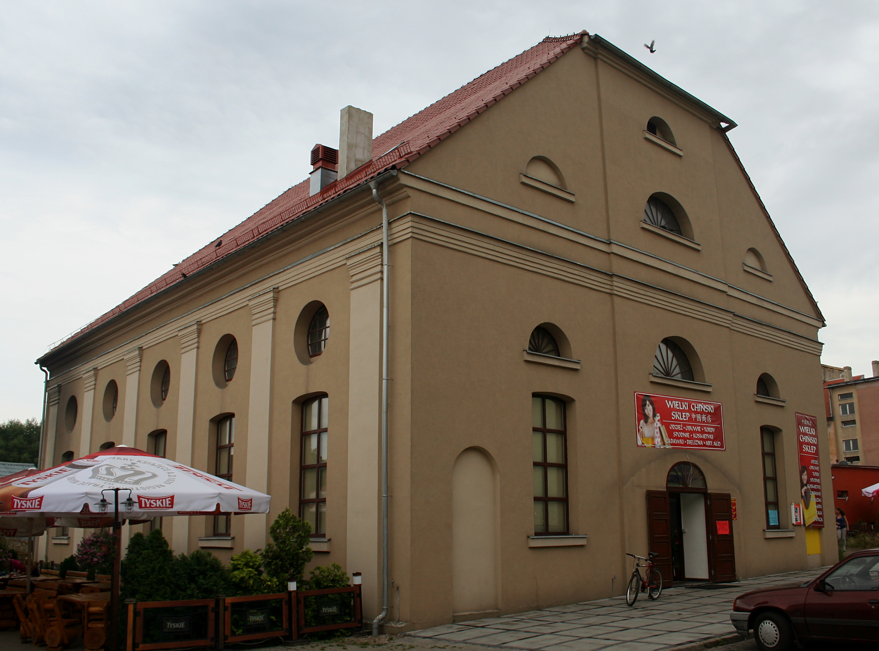 Międzyrzecz. Synagoga, ob. sklep